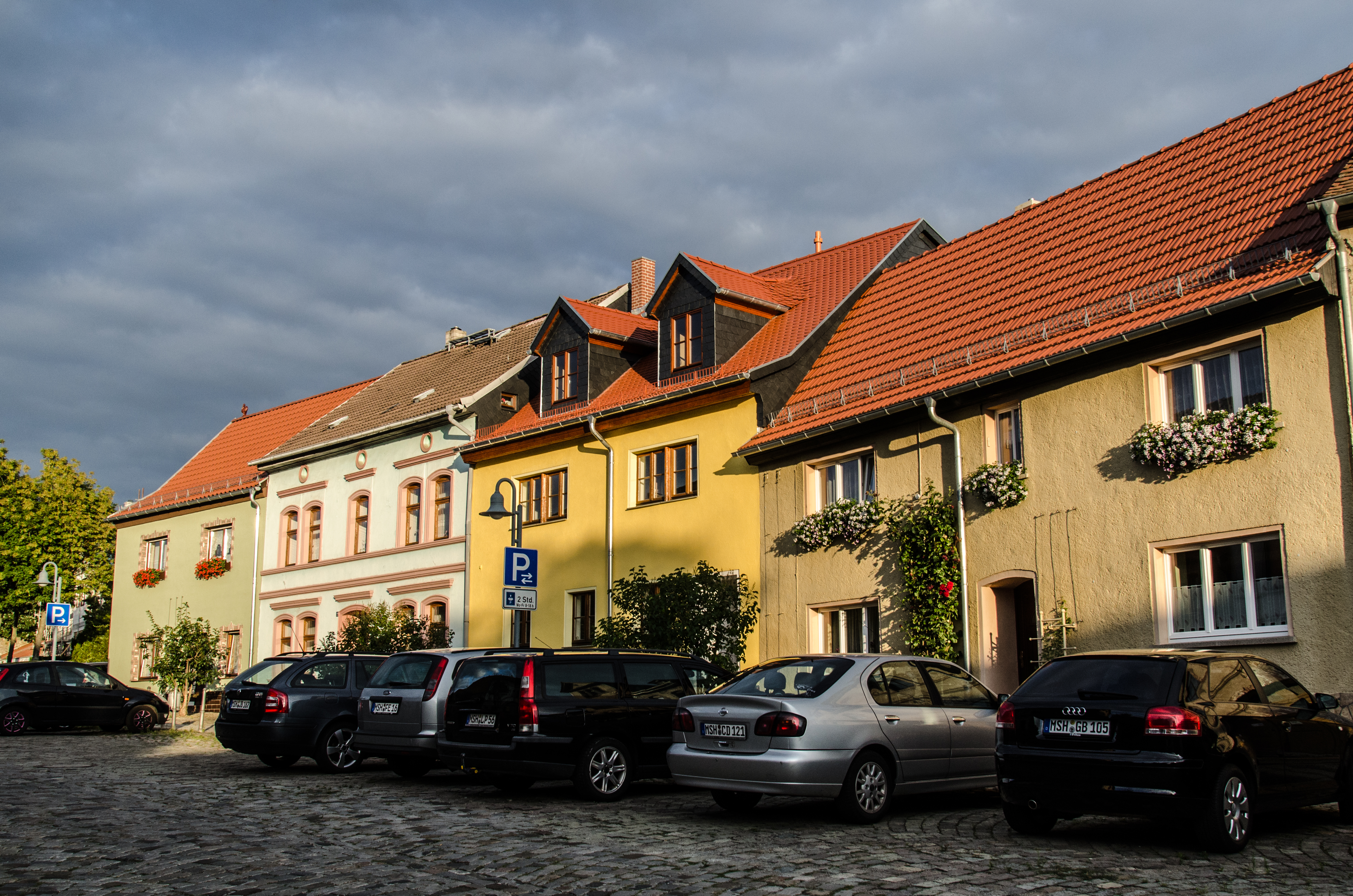 Sangerhausen, Alter Markt 24, 22, 30, 18